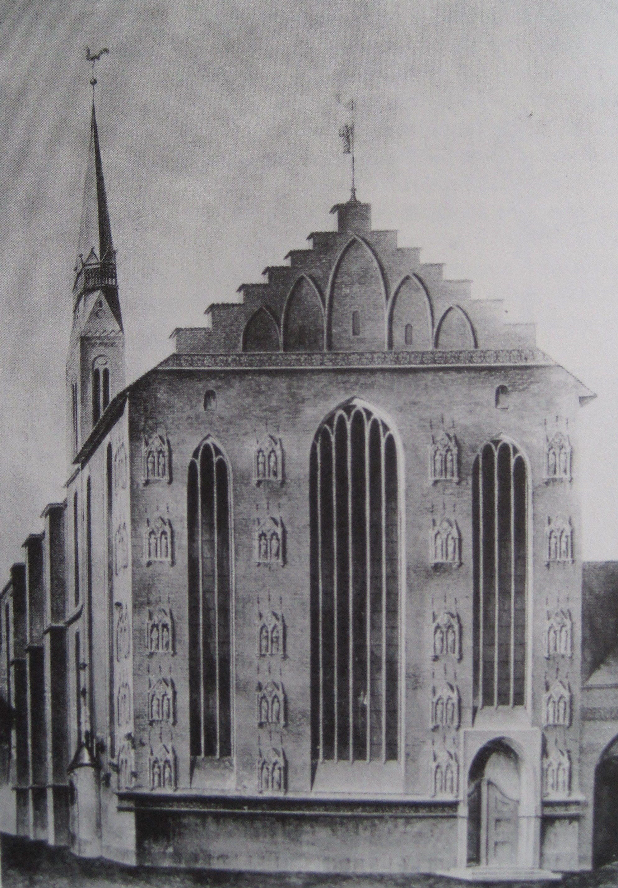 Die gerade Ostseite mit dem Chorabschluß der 1818 abgebrochenen Maria-Magdalena-Kirche des Lübecker Burgklosters an der Großen Burgstraße. Lavierte Federzeichnung der dreischiffigen Basilika. An der Seite links die halbrunde (sehr kleine) Küsel-Kapelle. Der Turm ist in der Proportion etwas zu schlank geraten. Er steht im südlichen Seitenschiff im dritten Joch (von Osten gesehen) gleich hinter der Küsel-Kapelle, also nicht wie sonst üblich im Westen des (Mittel-)Schiffs. Augenfällig die Verzierung der Chorwand mit 20 Skulpturenpaaren.